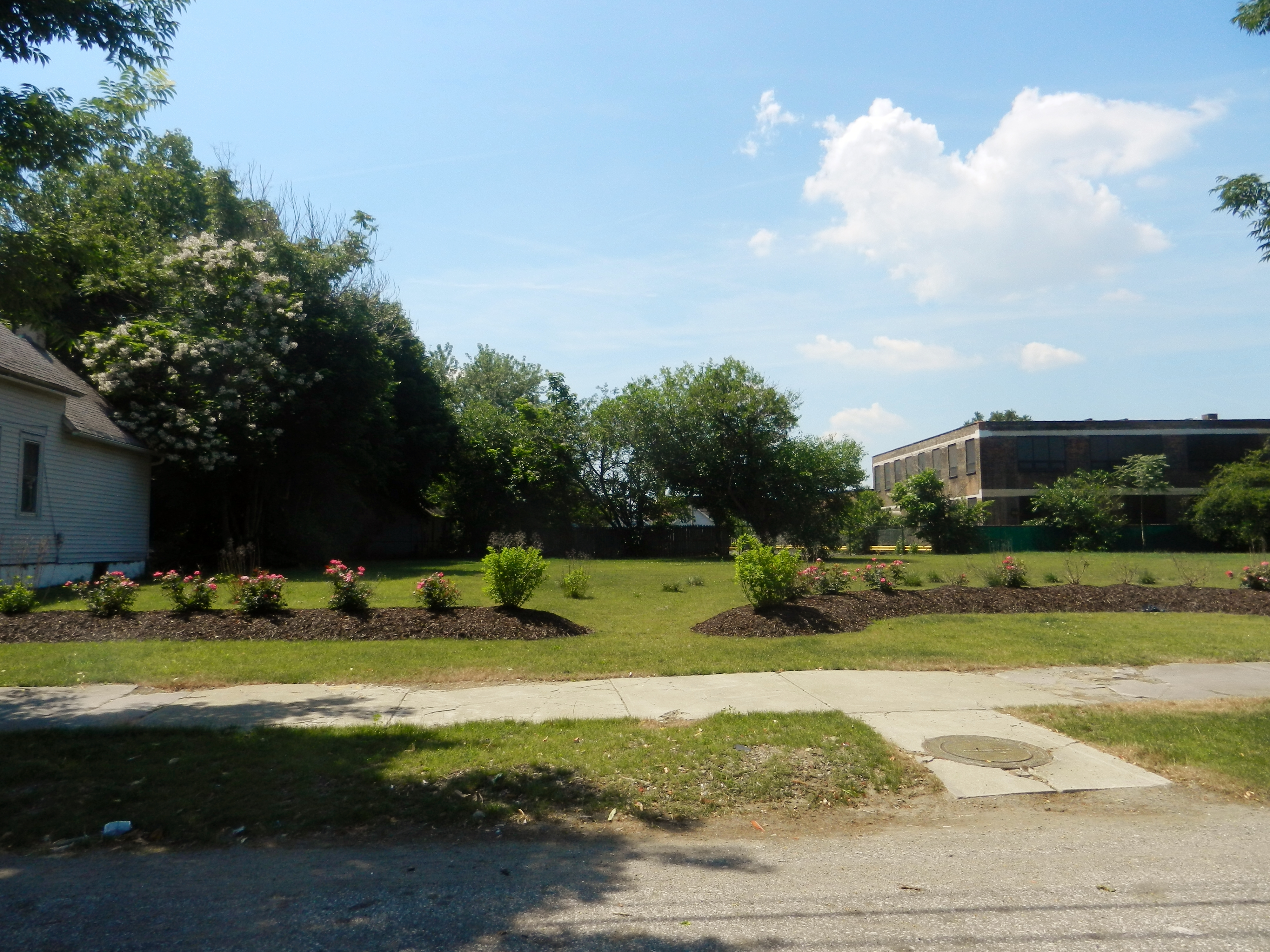 Seymour Avenue